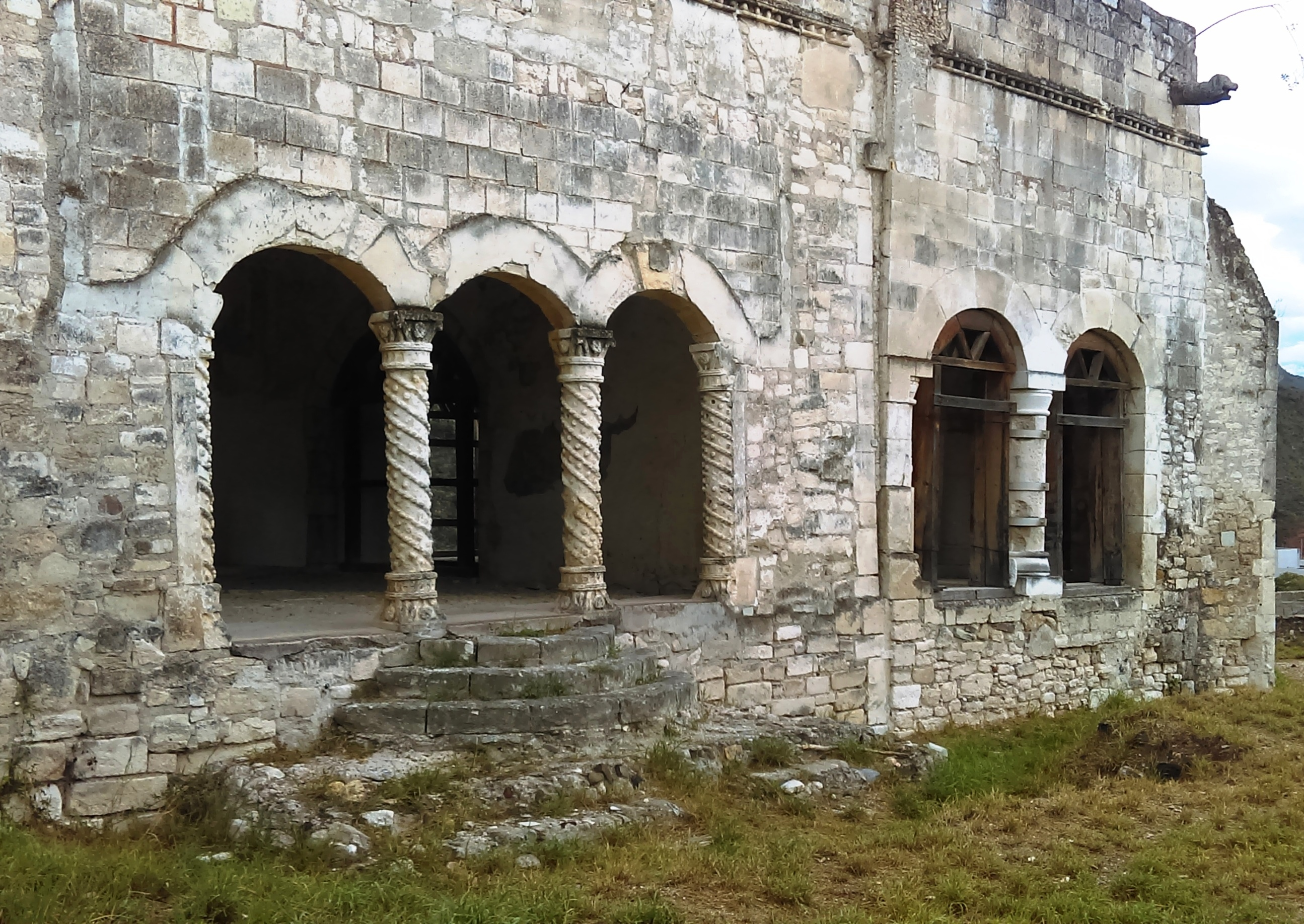 La Tercena de Metztitlán.